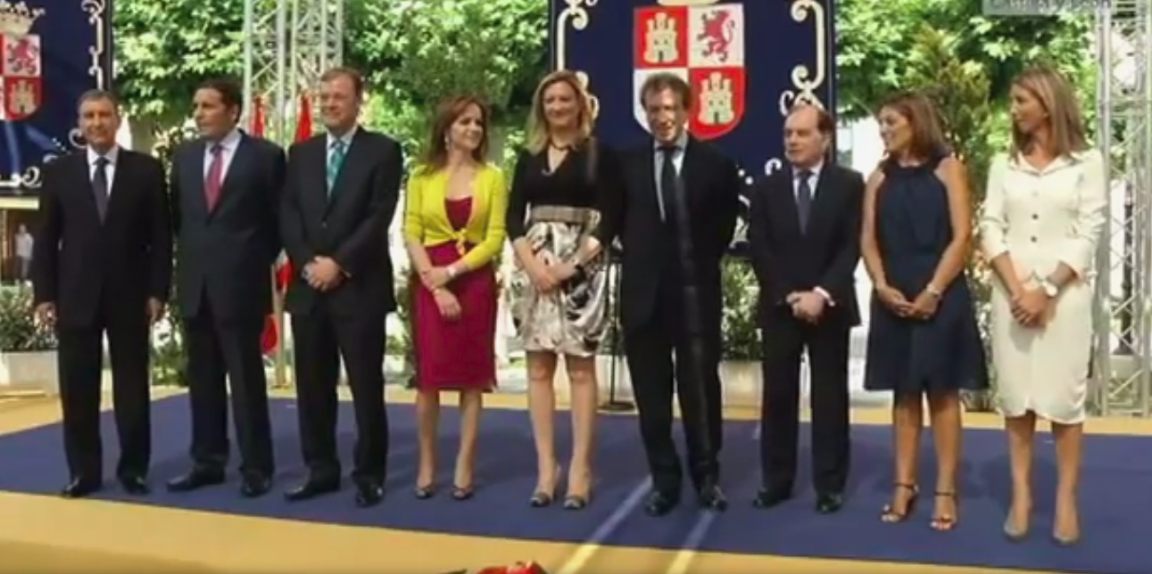 Toma de posesión de los nuevos Consejeros